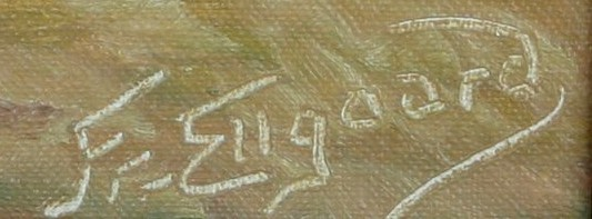 Konstnären Frederik Ellgaards signatur